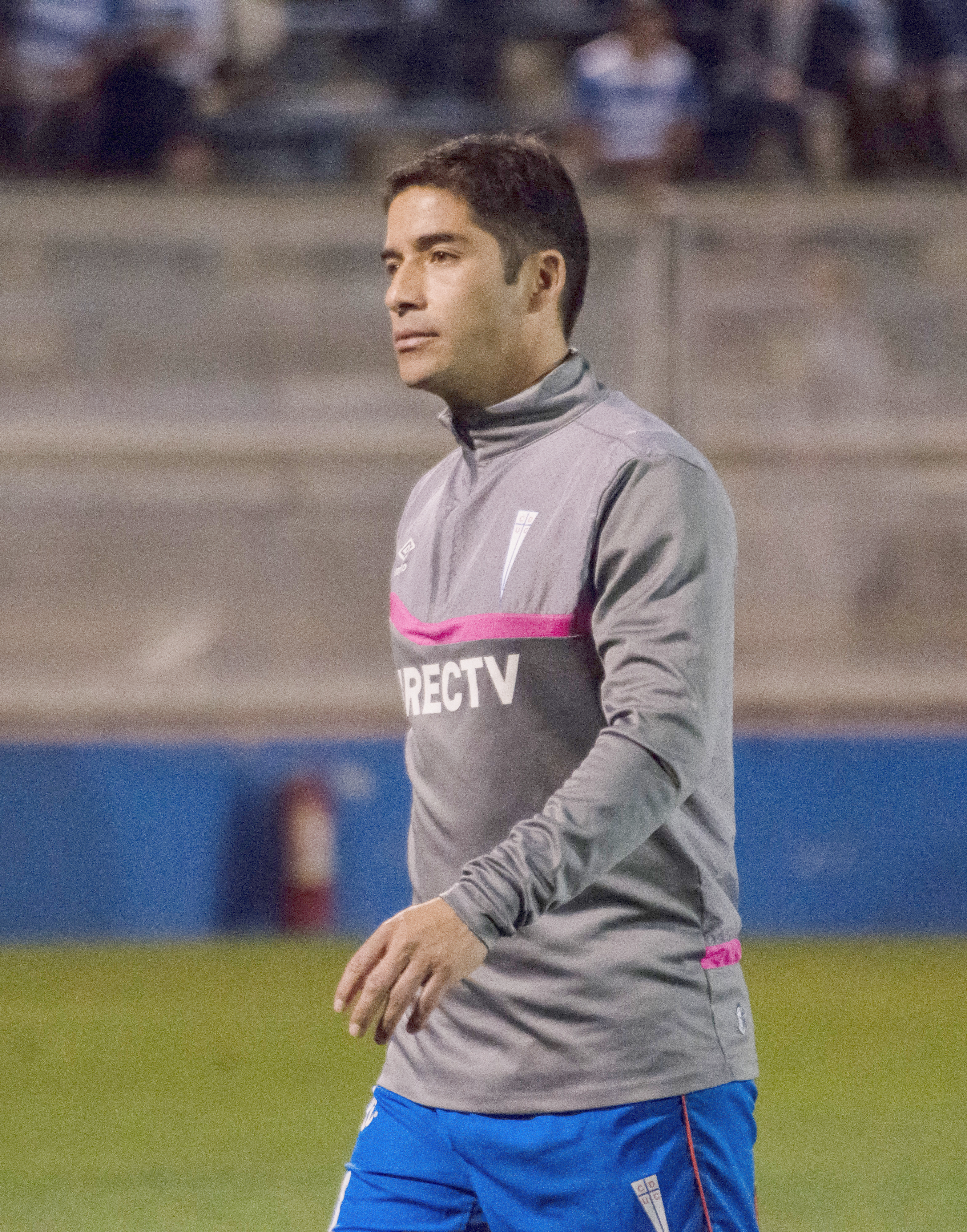 Universidad Católica v Huachipato, Estadio San Carlos de Apoquindo, Las Condes, Santiago, Chile.